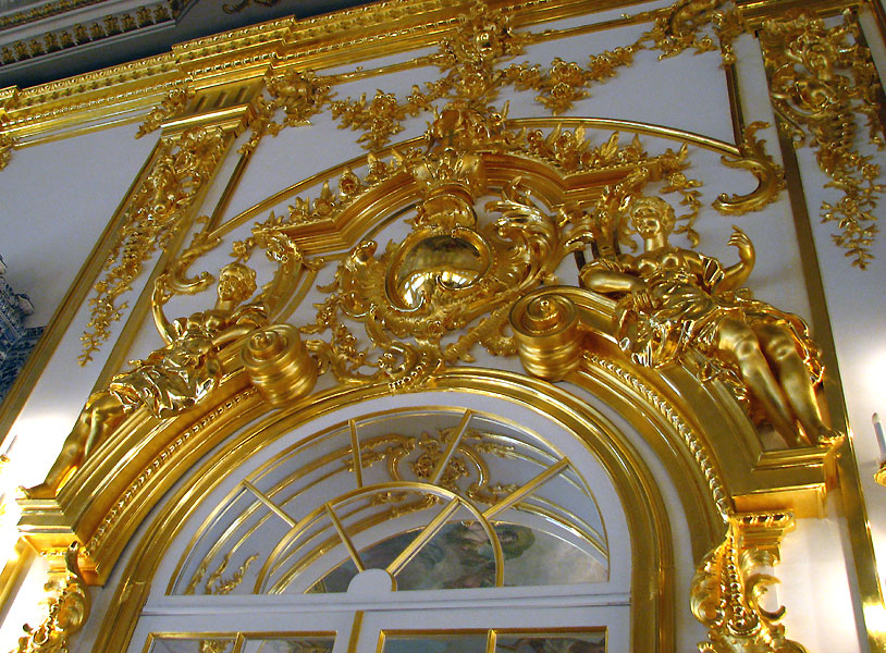 Десюдепорт